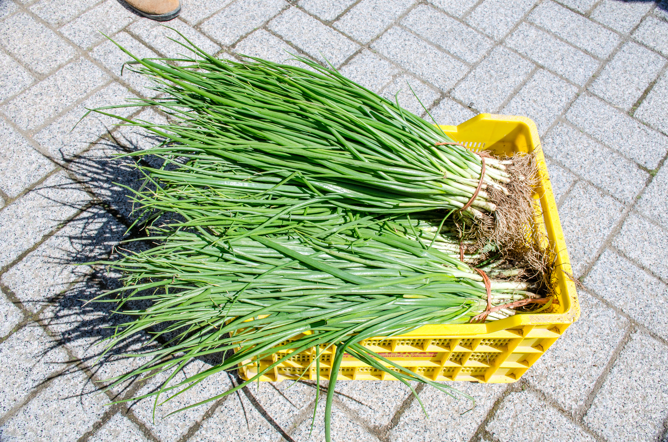 Atados de plantones de cebollas horcales. Transacción entre particulares en Villadiego. Mayo de 2017.